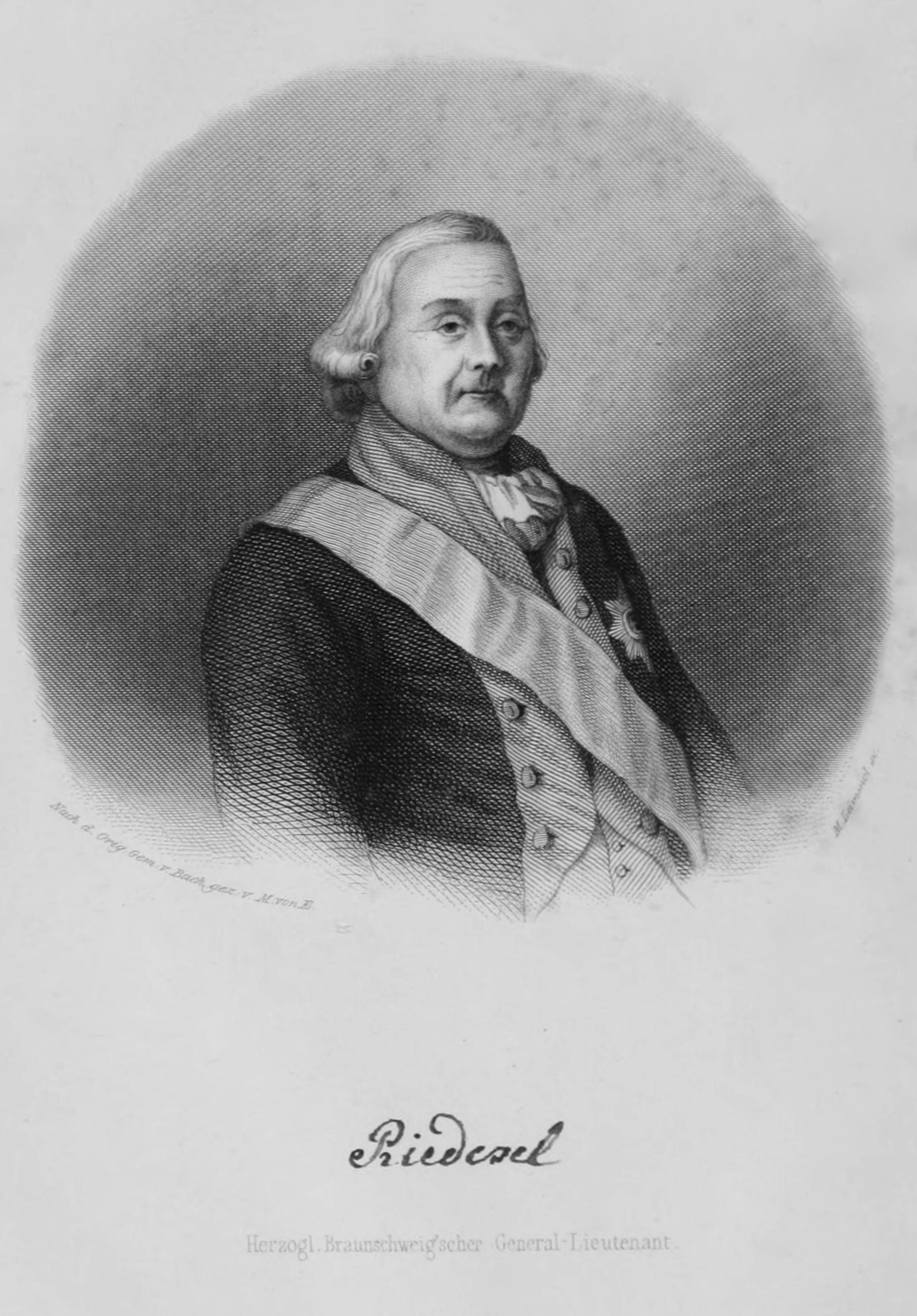 Friedrich Adolf Riedesel Freiherr zu Eisenbach (* 3. Juni 1738 in Lauterbach (Hessen); † 6. Januar 1800 in Braunschweig), braunschweig-wolfenbüttelscher General